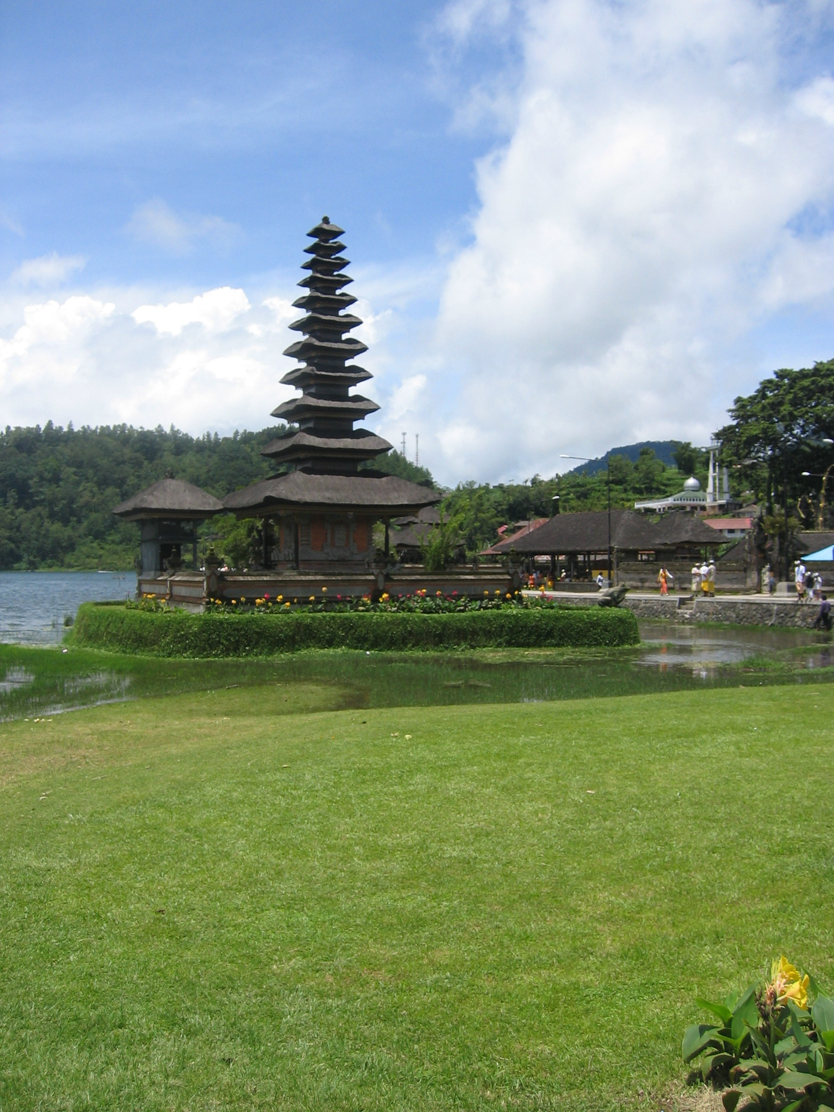 Hindu Temple in Bratan.